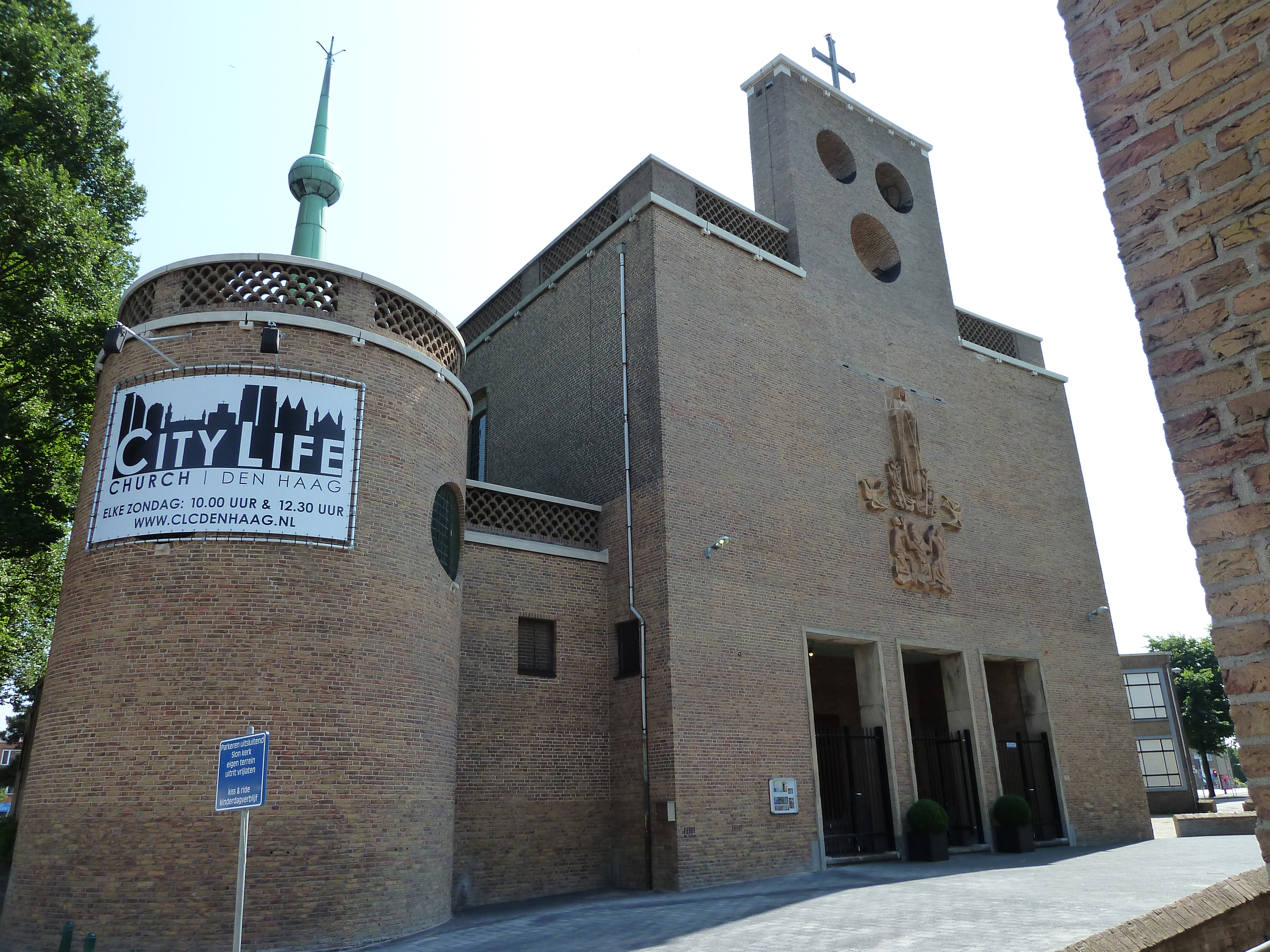 City Life Church (voorheen Fatimakerk), te Den Haag